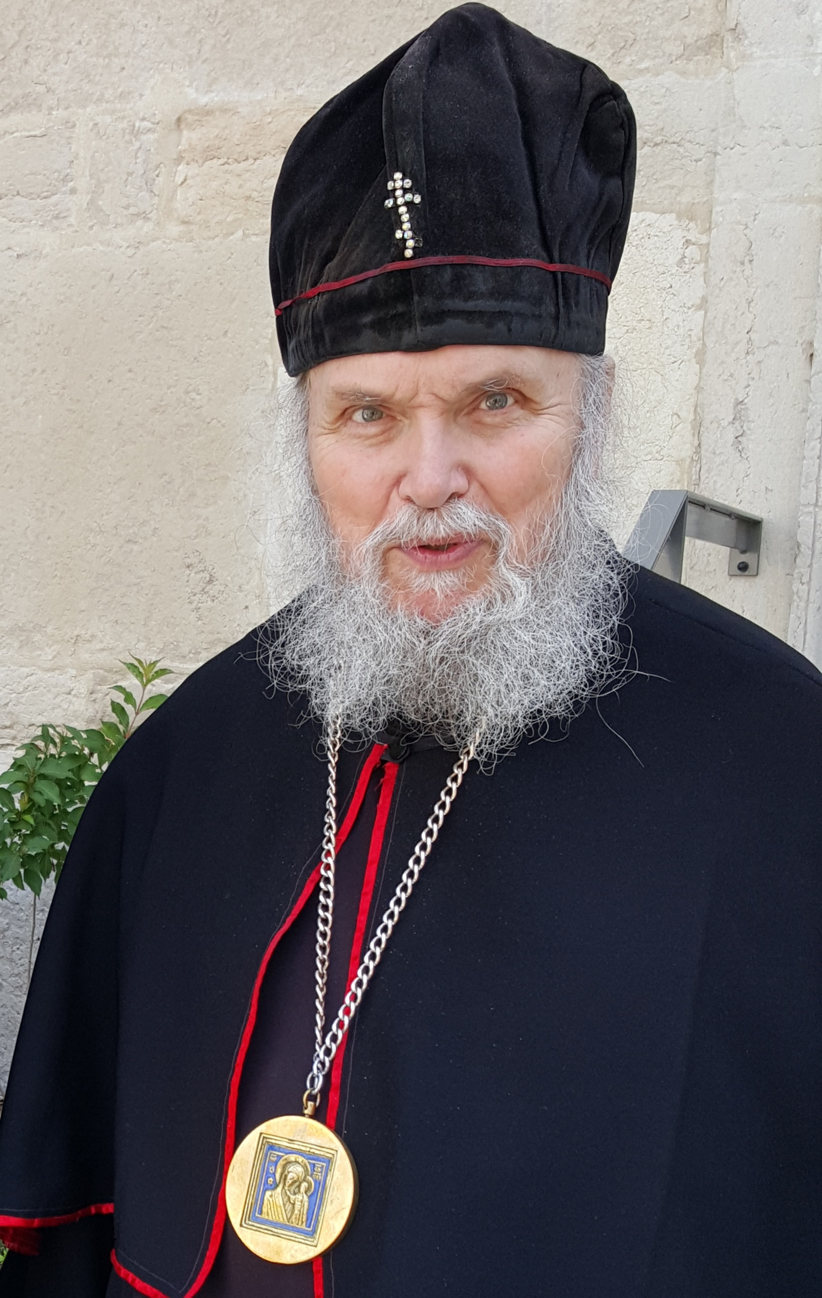 Évêque vieux croyant de Koursk